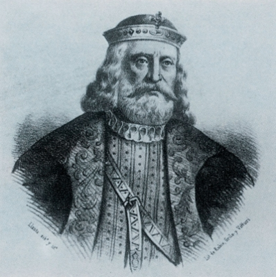 Esta é uma ilustração de Aznar I Galíndez. Possui propósito meramente ilustrativo.